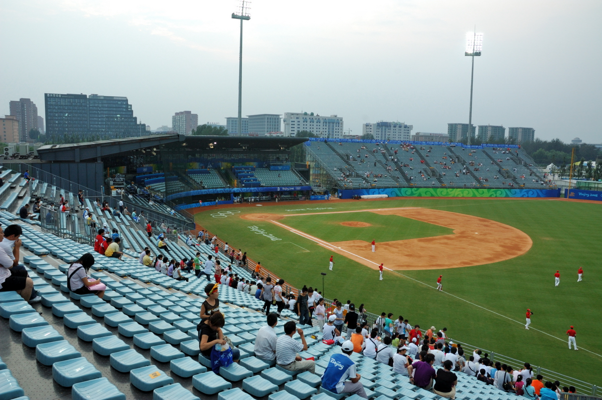 Wukesong Baseball Field